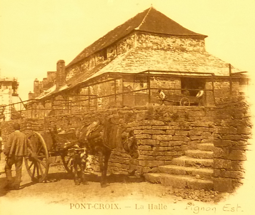 Les halles de Pont-Croix, construites vers 1650 et détruites en 1950.